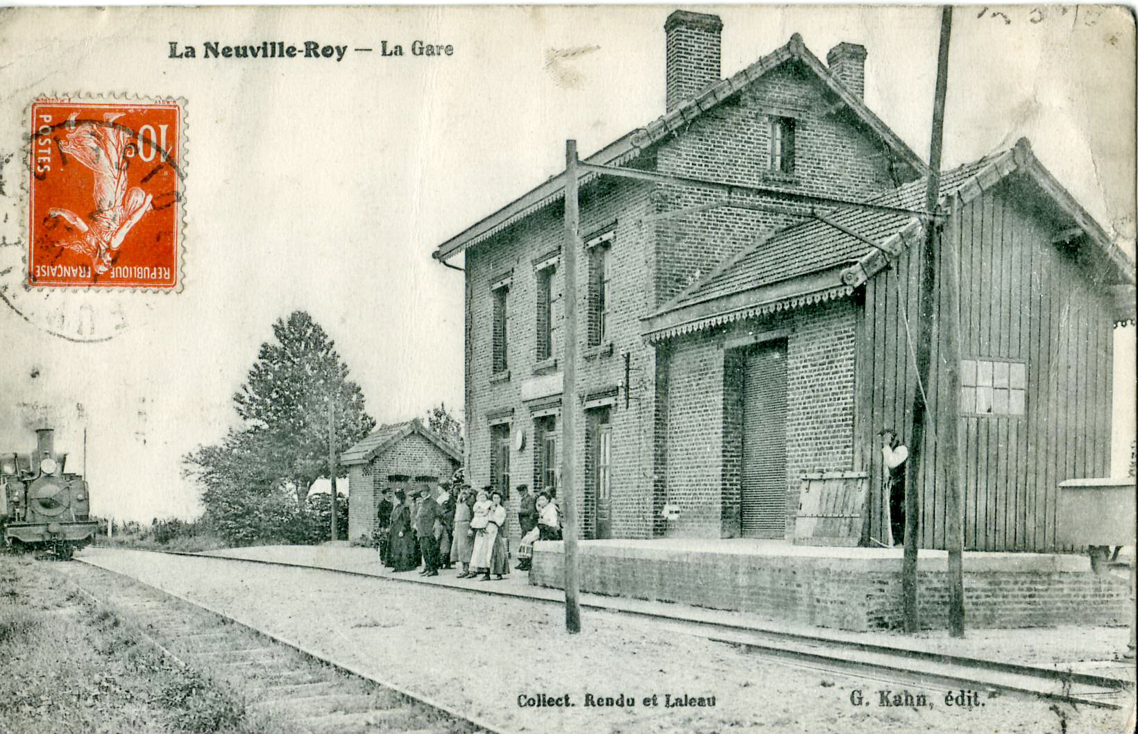 Carte postale ancienne, collection Rendu et Laleu, édition G. KahnGare de La Neuville-Roy (Oise - Picardie - France) sur la Ligne Estrées-Saint-Denis - Froissy - Crèvecœur-le-Grand